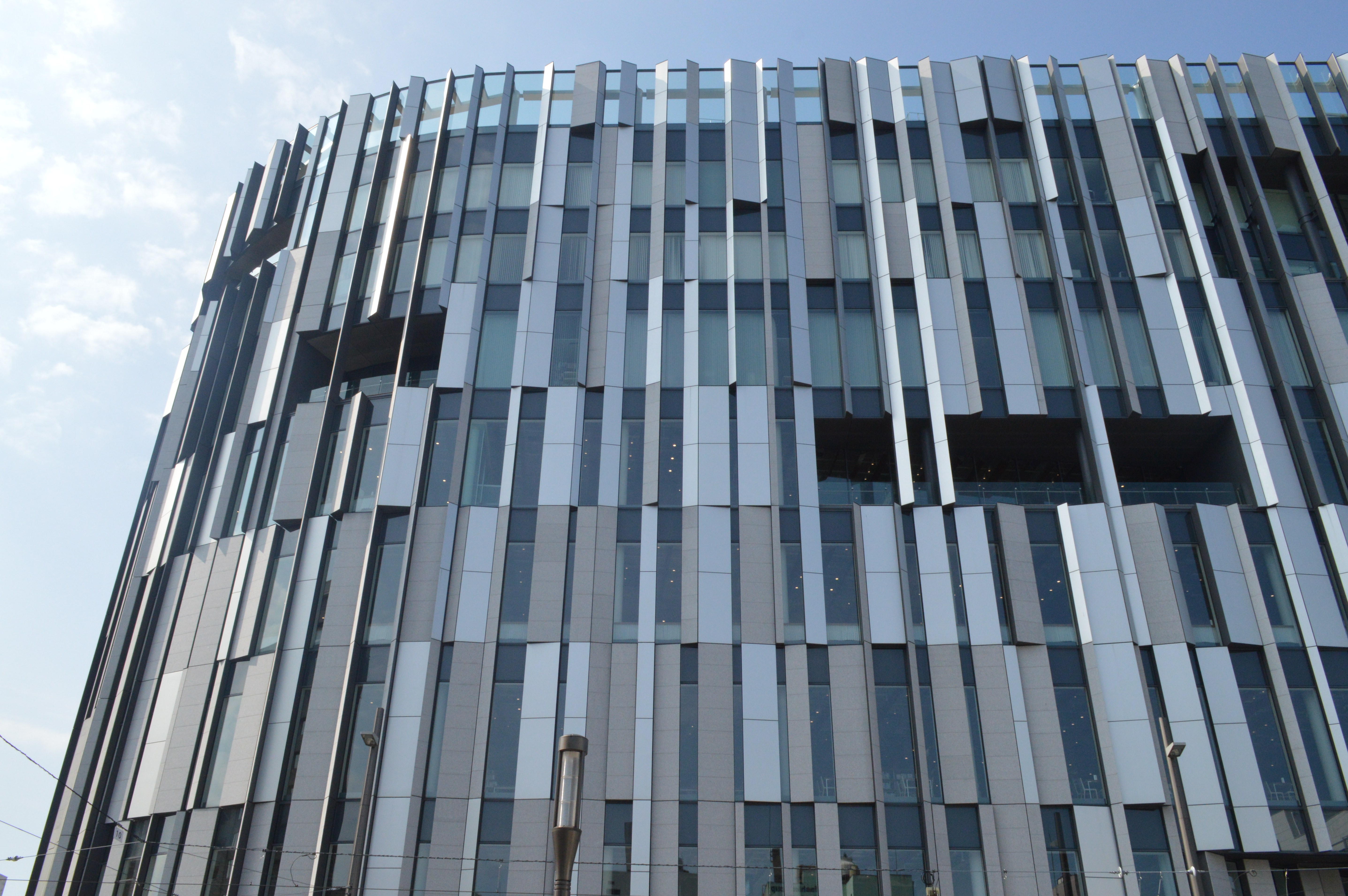 TOYAMAキラリの外観。7月30日の9時ちょうど頃。